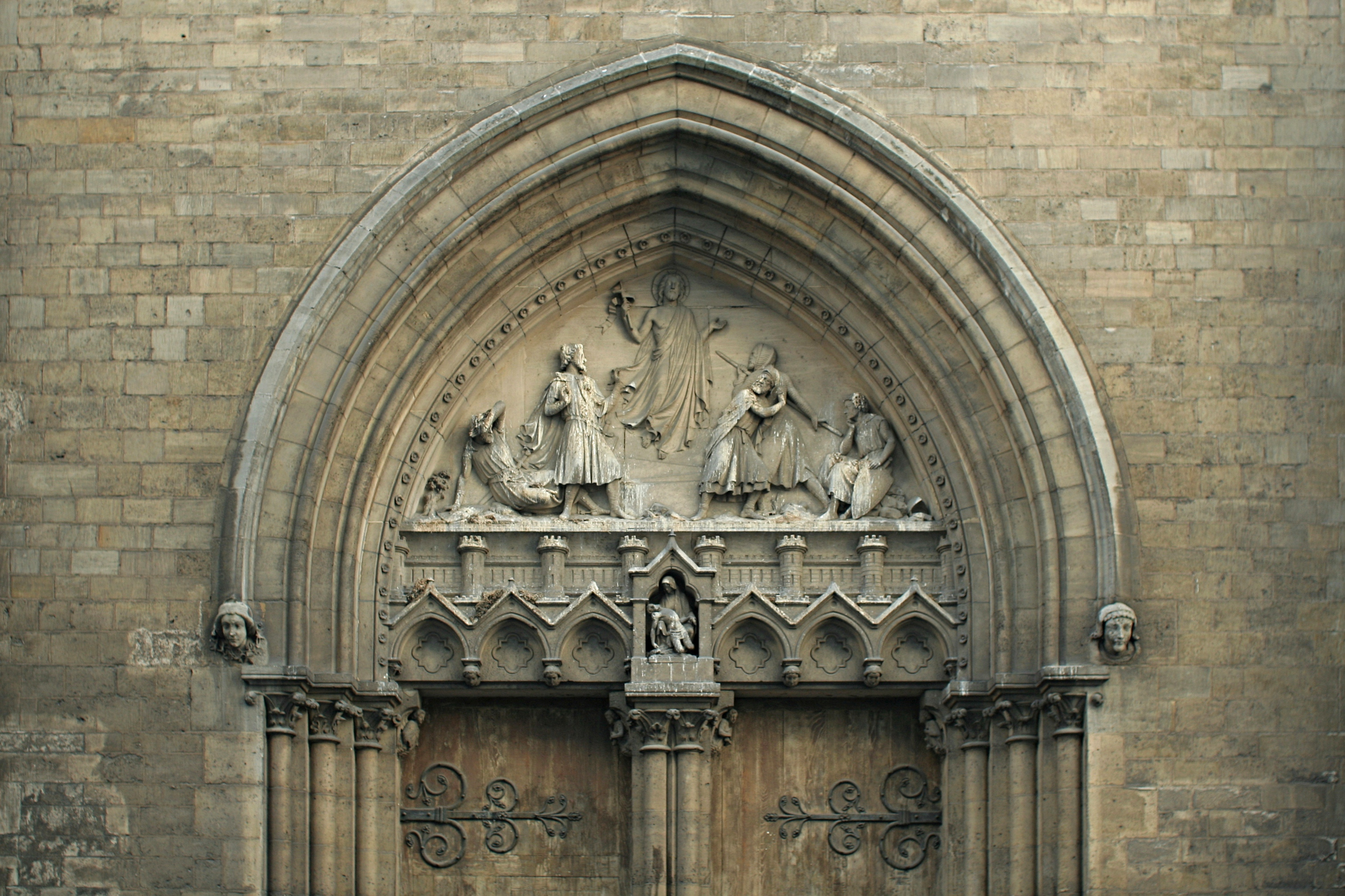 Église Saint-Jean-Baptiste de Belleville, Paris 19e arrondissement. Tympan du bras droit du transept, sur la rue de Palestine :La résurrection de Jésus. Le tombeau du Christ est gardé par cinq soldats : deux sont en admiration et en prière, un autre réfléchit, un autre encore se sauve, épouvanté, et le dernier tente de percer le Christ de sa lance.